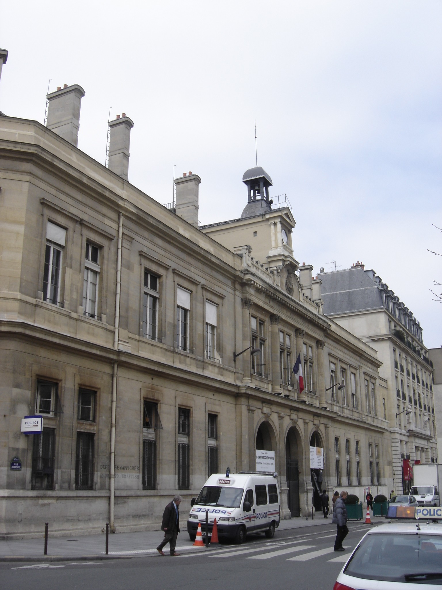 Paris - Mairie du 6ème arrondissement